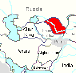 Canato di kokand